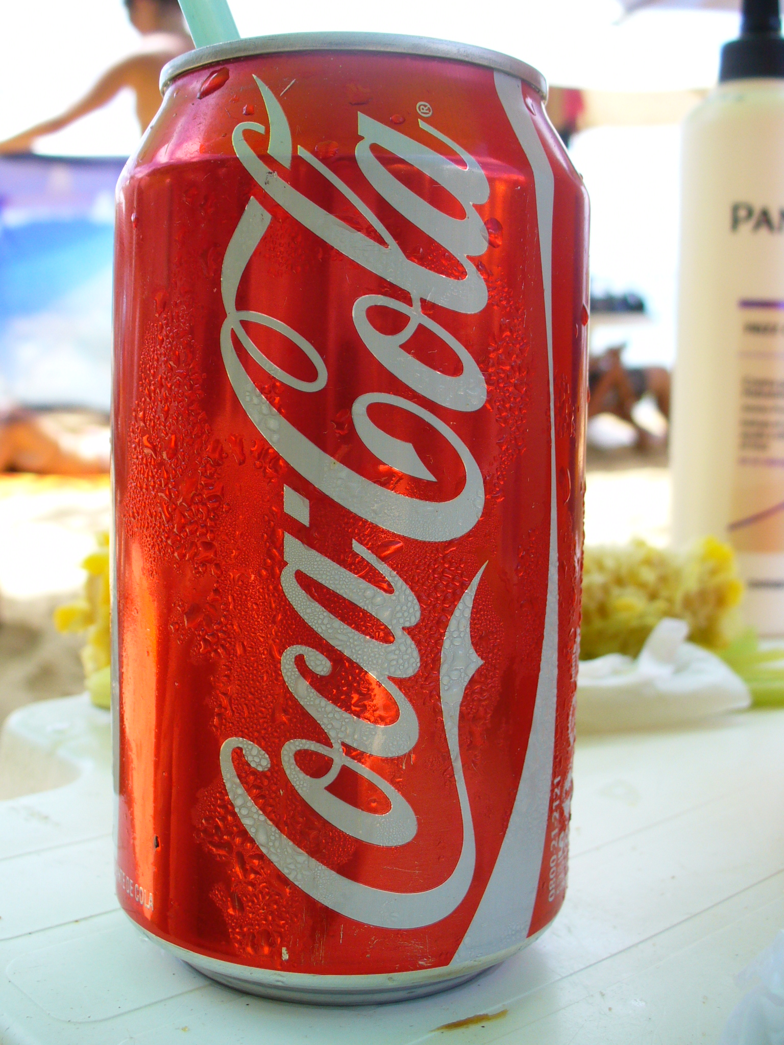 Lata de Coca Cola.